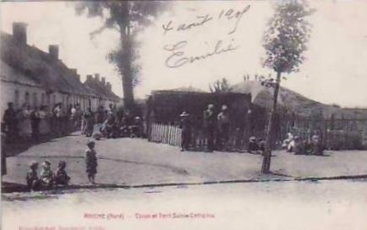 Aniche corron et terri sainte-catherine